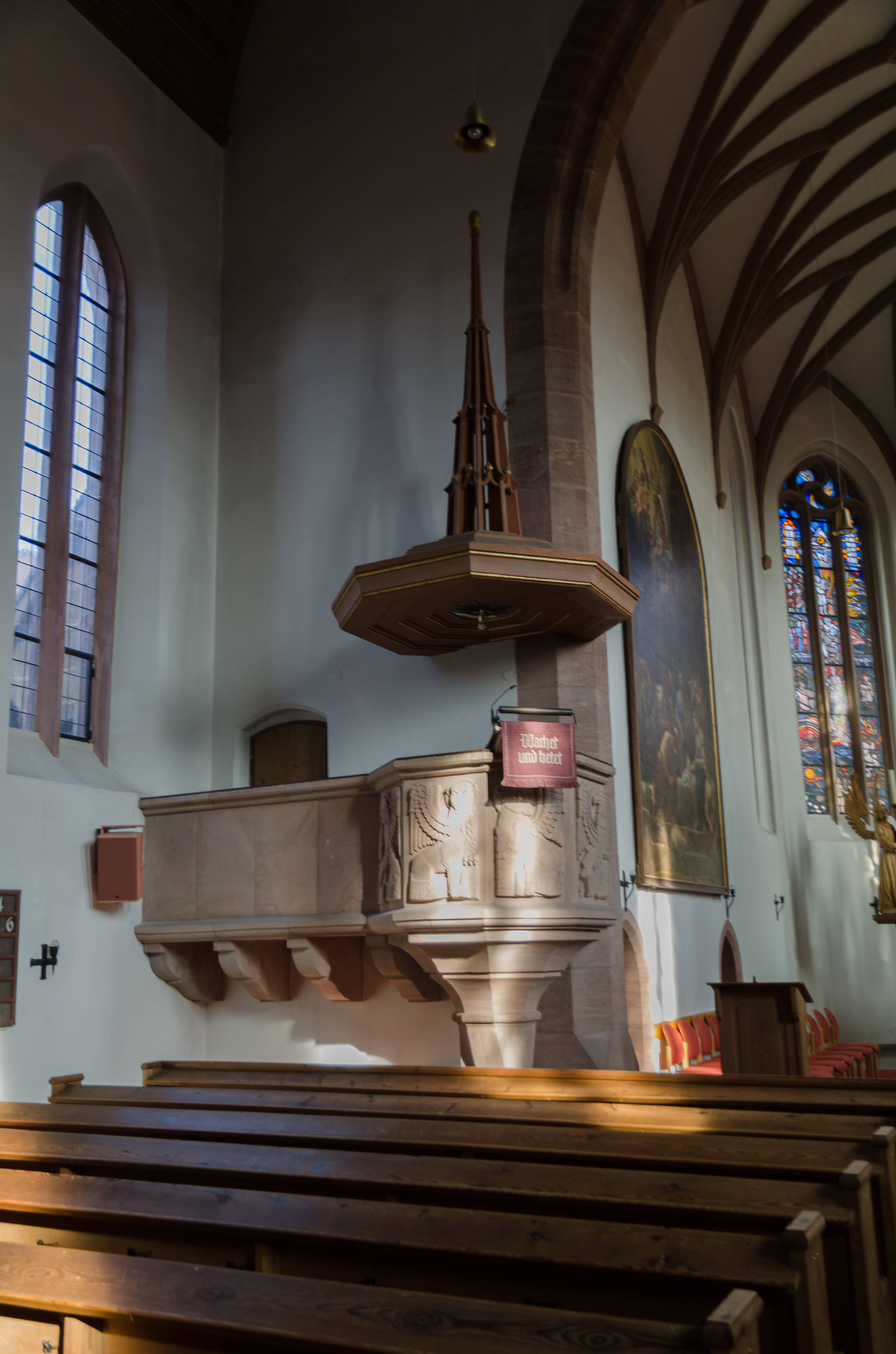 Merkendorf, ev. Stadtpfarrkirche Unser Lieben Frau